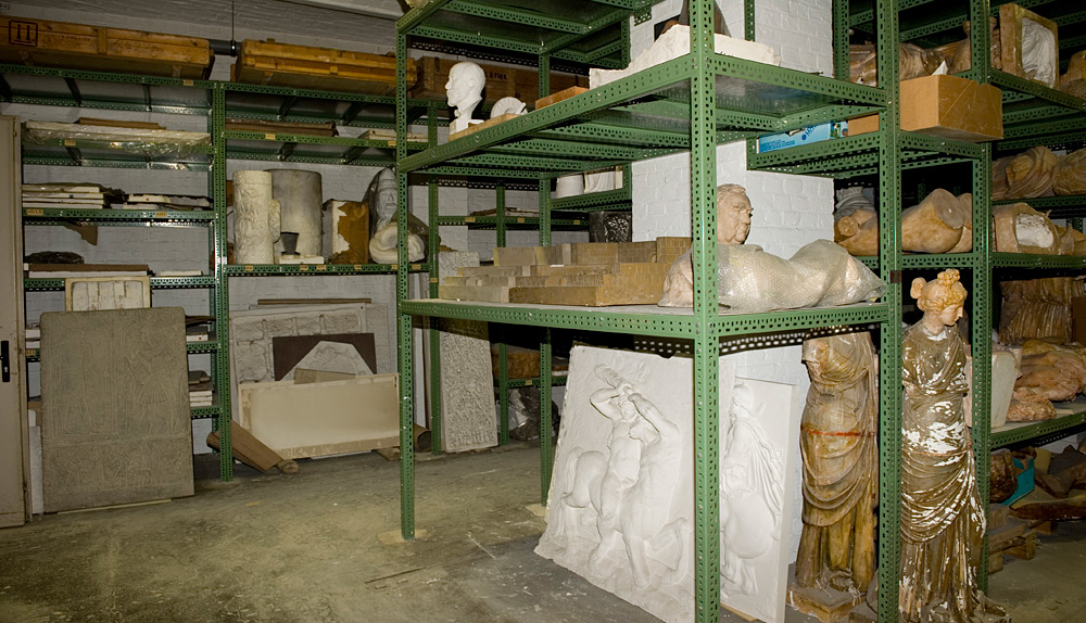 Gipsformlager, Gipsformerei "Staatliche Museen zu Berlin" (Sophie-Charlotten-Straße 17/18, 14059 Berlin-Charlottenburg)